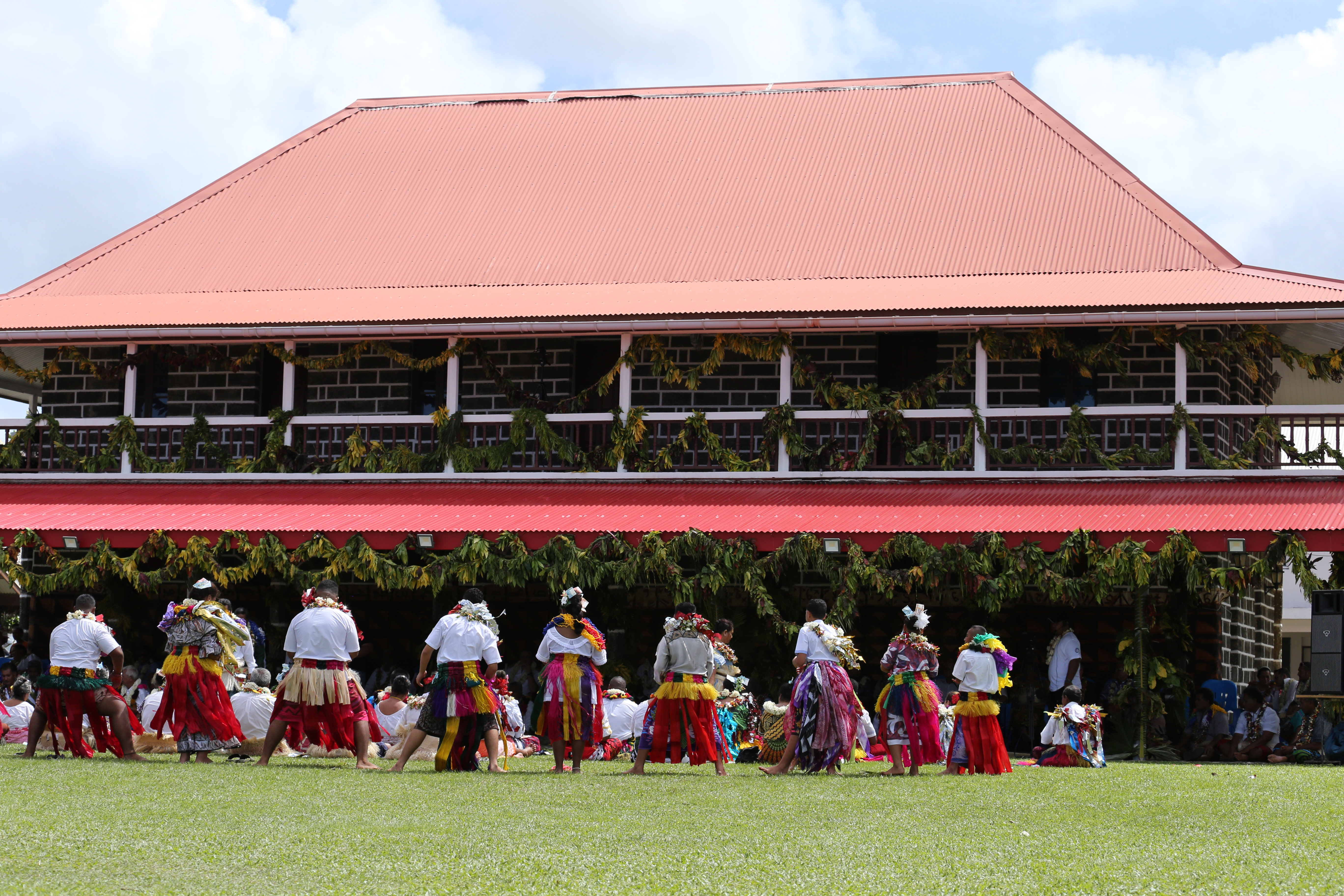 Les groupes représentent leurs villages respectifs en donnant leur meillleur.